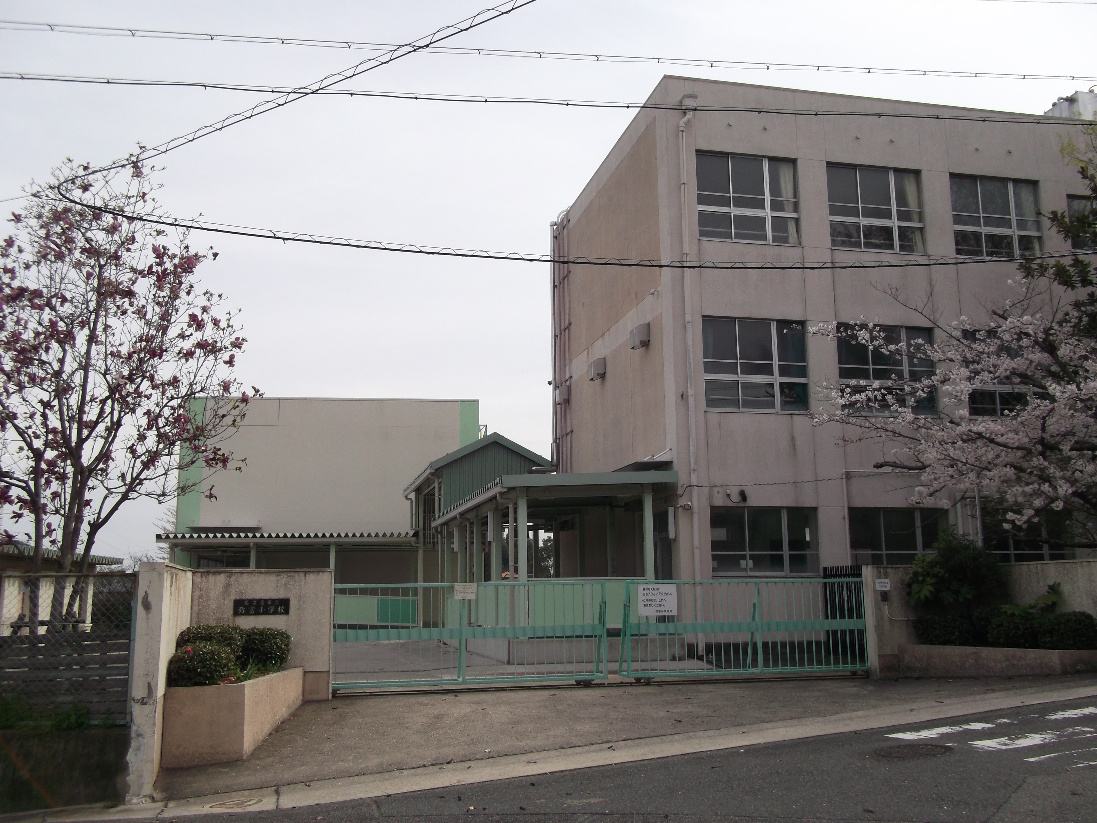 名古屋市瑞穂区日向町の名古屋市立弥富小学校を北側より撮影